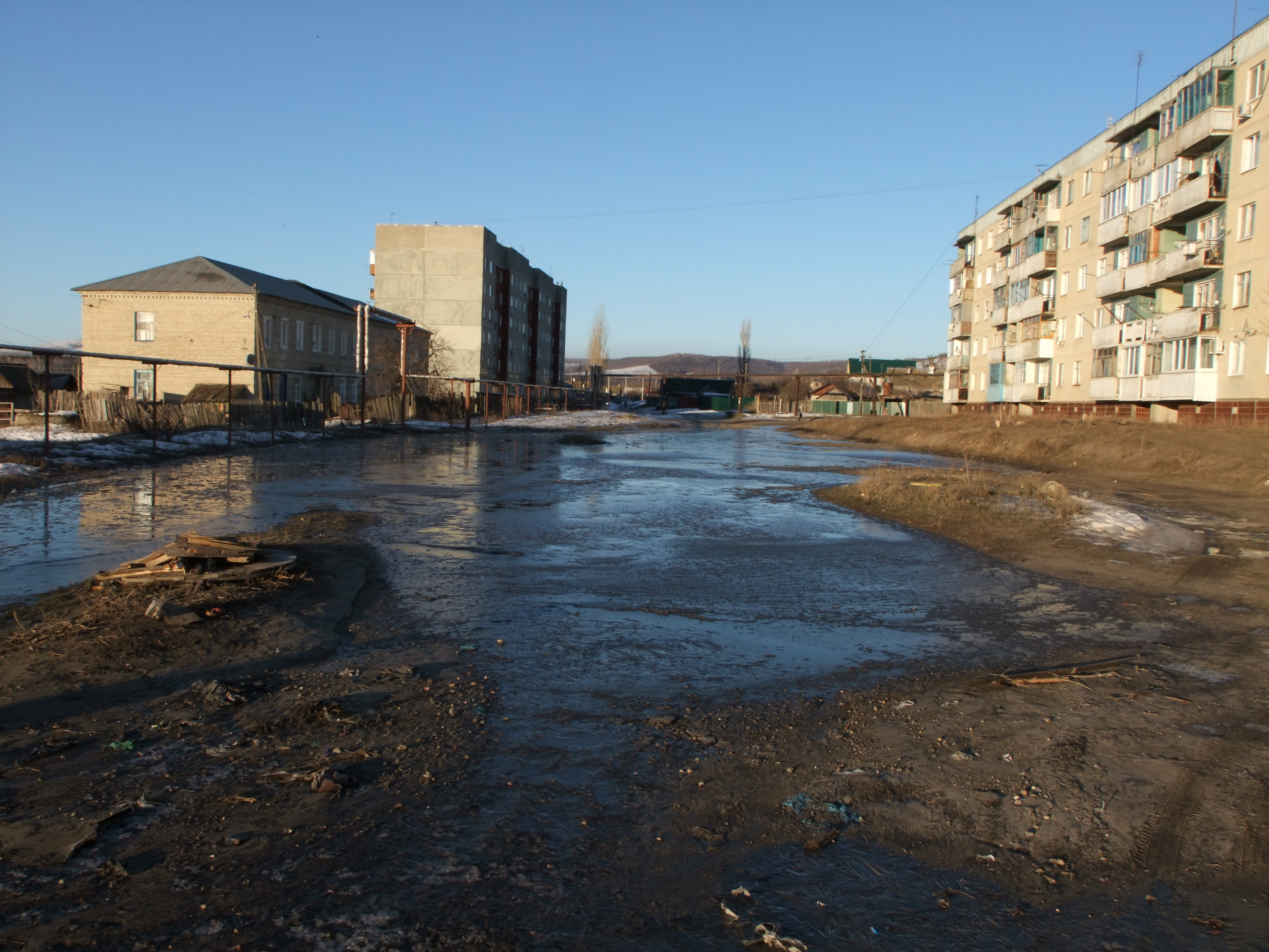 Весна